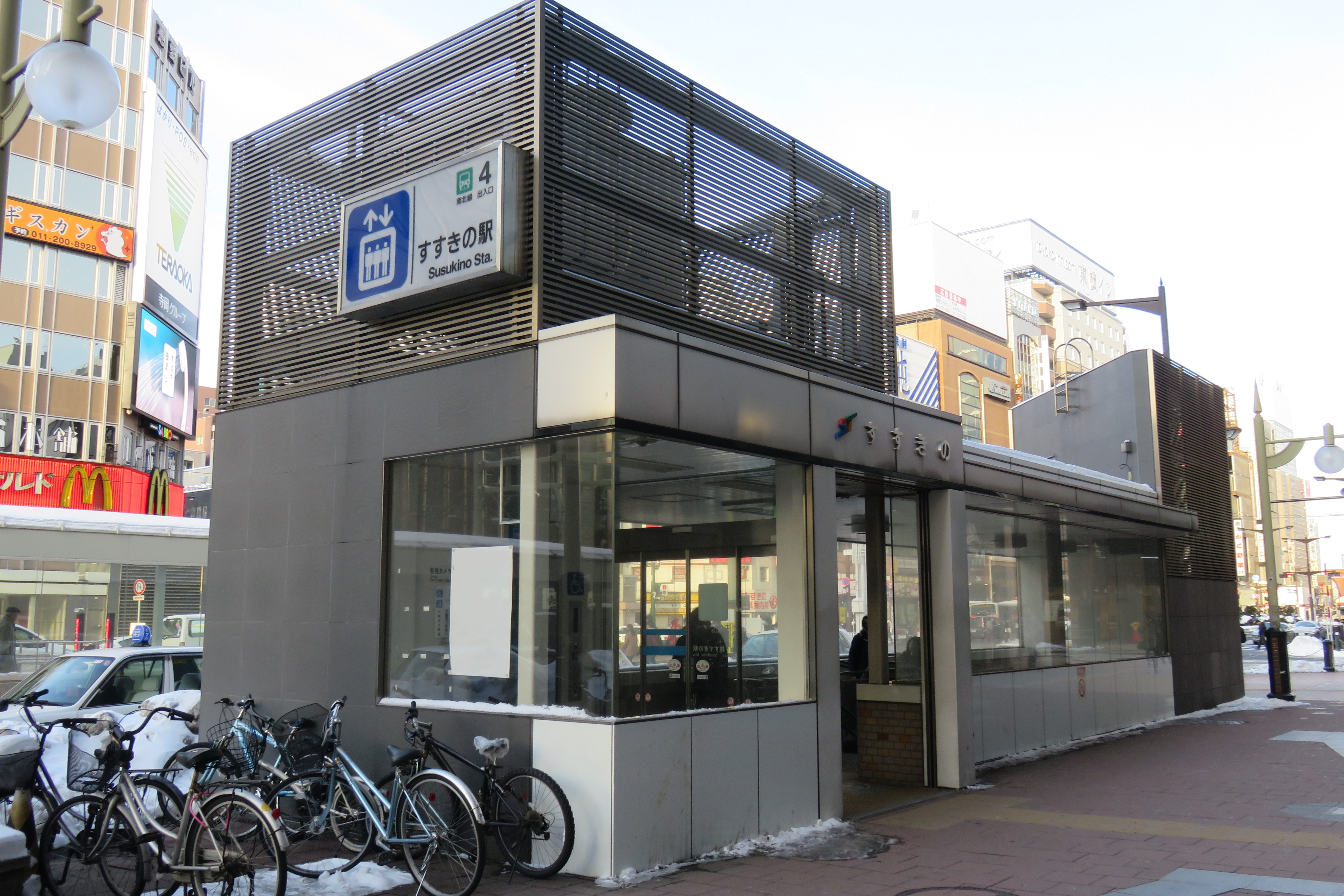 すすきの駅4番出入口